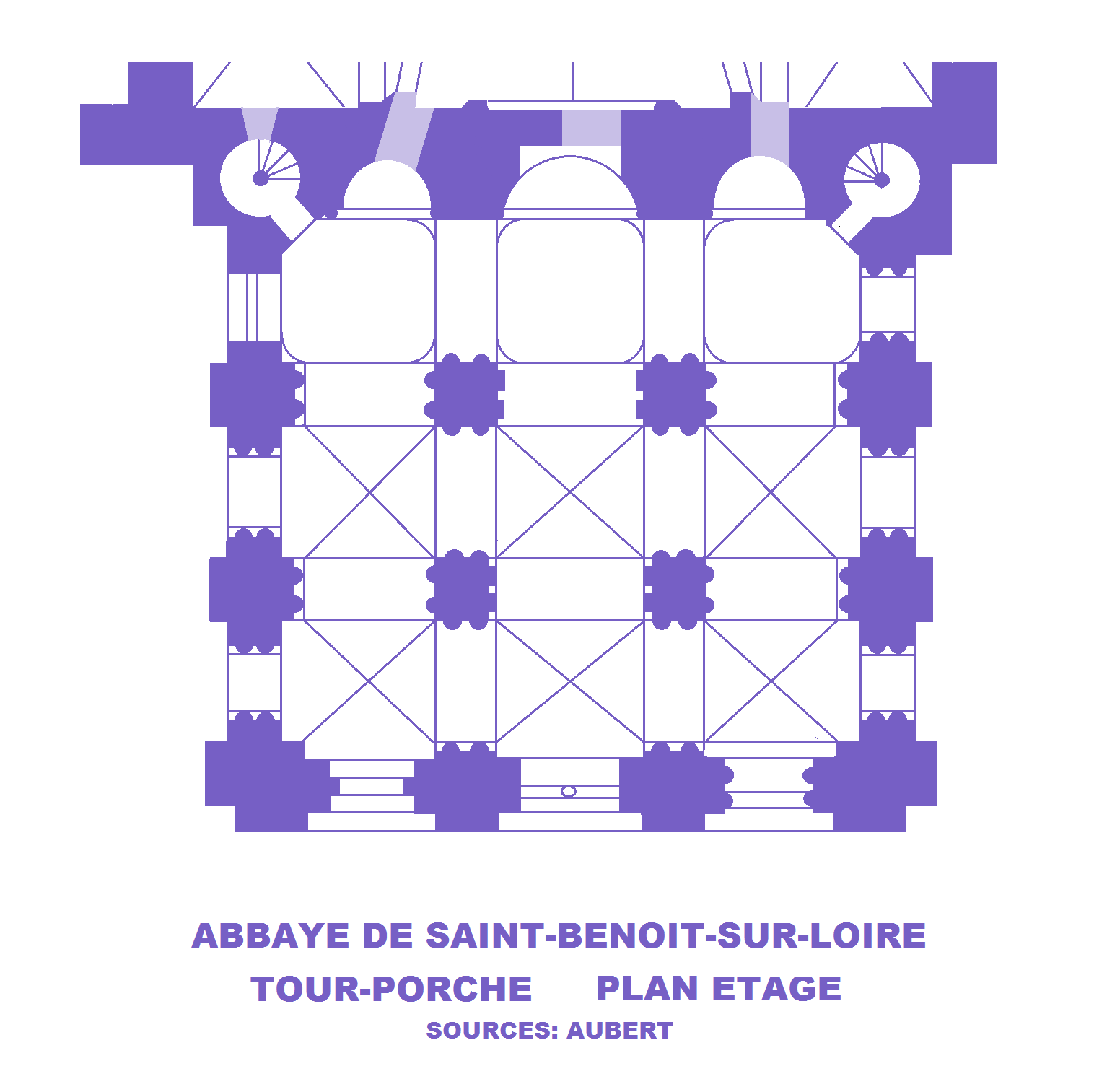 Abbaye de Saint-Benoît-sur-Loire, plan de l'étage de la tour-porche